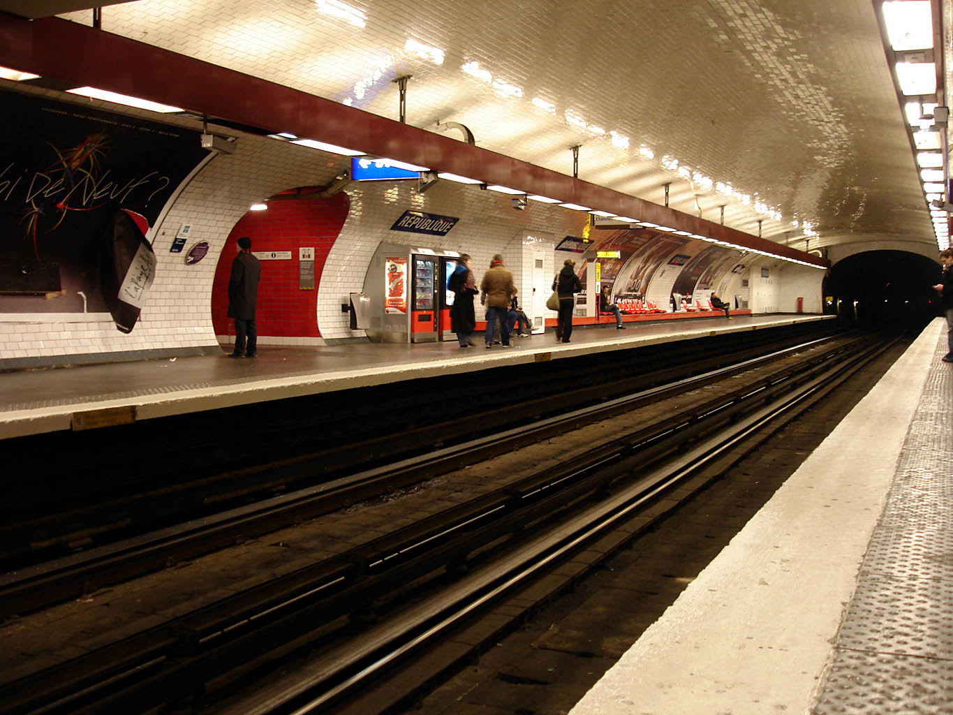 Métro de Paris (France) - ligne 11 - Station République